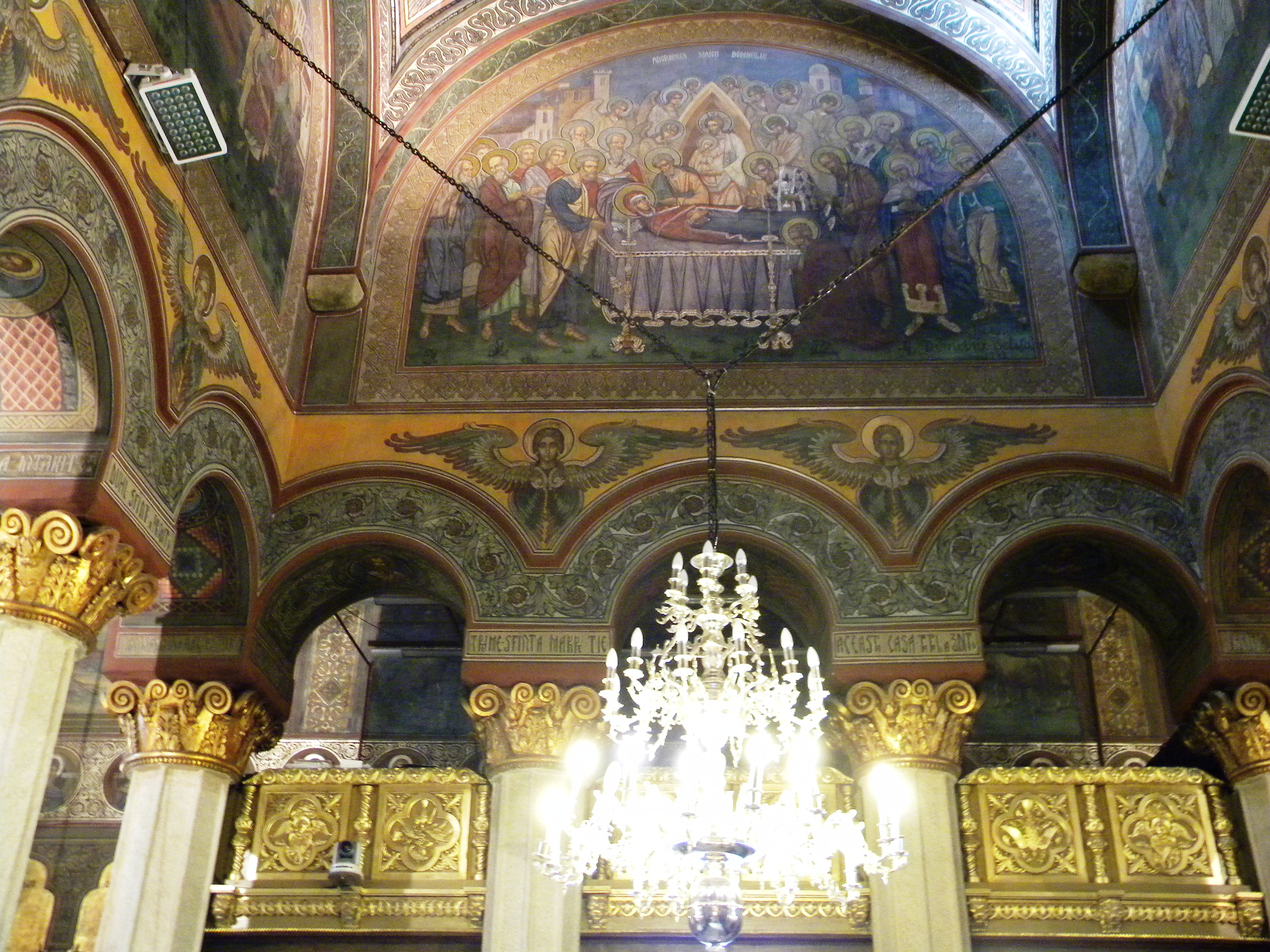 Bucuresti, Romania, Catedrala Patriarhala; B-II-m-A-18571.01 (interior 7) 01